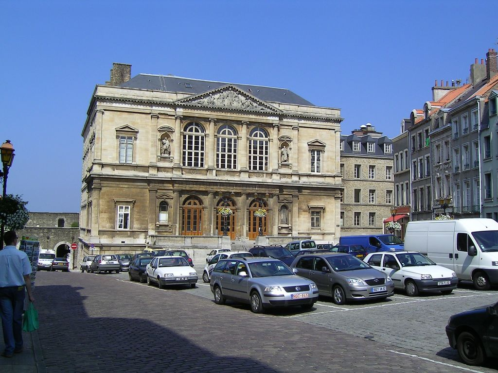 Palais de Justice (Vieille Ville) Photo personnelle (own work) de Marianna